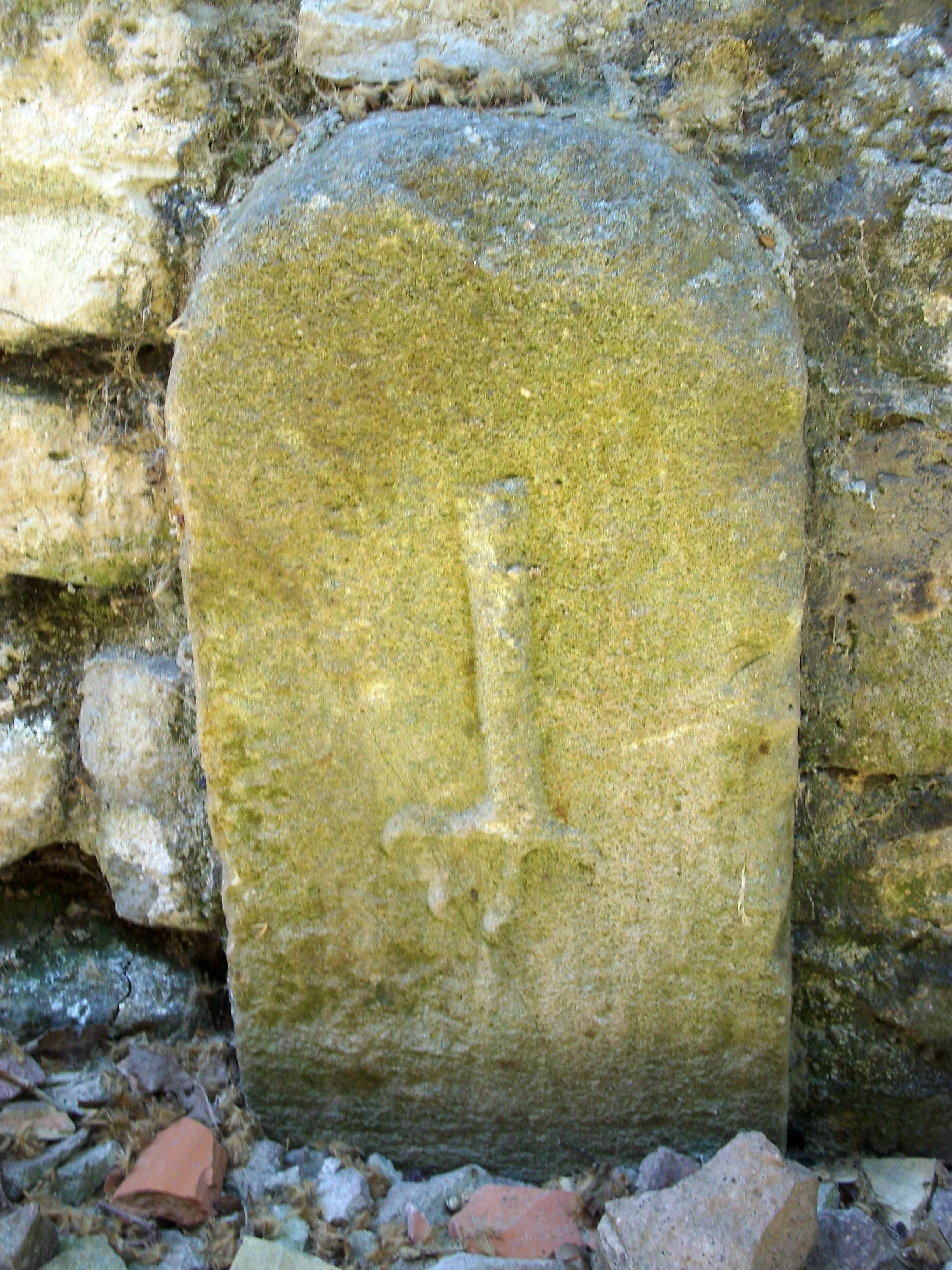 Vierseithof; nobler spätklassizistischer Zeltdachbau, 1870, Architekt M. Dietz, Ausstattung; Ökonomie, säulengestützter zweischiffiger Gewölbestall; offene Remise mit Wohngeschoss, 1910, Architekt Johann Dietz I.; ummauerter parkartiger Garten; Grenzstein, wohl von 1601